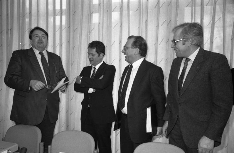 04.02.1983 Konferenz der Ministerpräsidenten der Bundesländer in der Landesvertretung Rheinland-Pfalz.